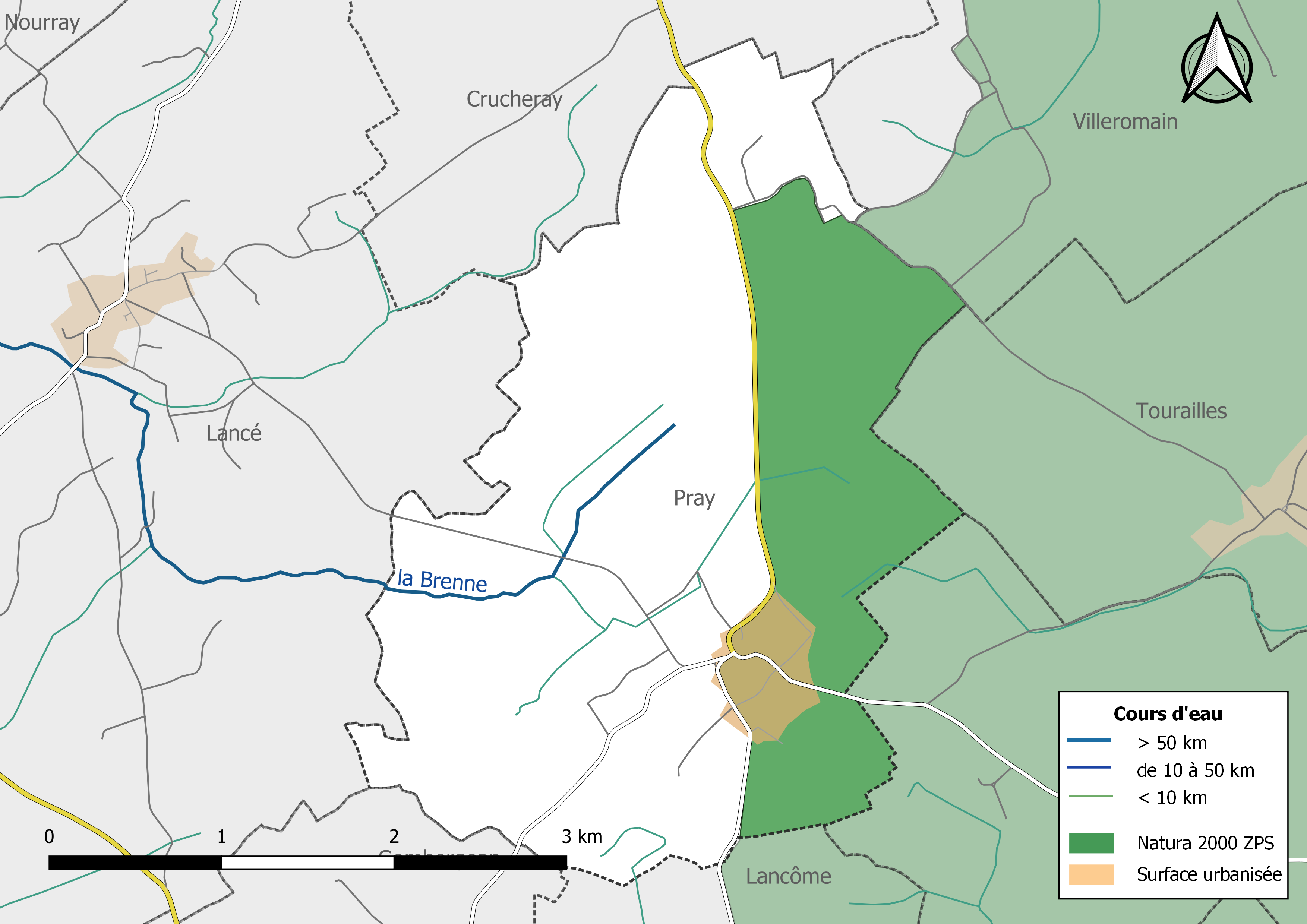 Carte du sitesu Natura 2000 de type ZPS de la commune de Pray (France).